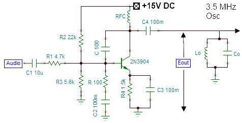 Reaktiivmodulaator